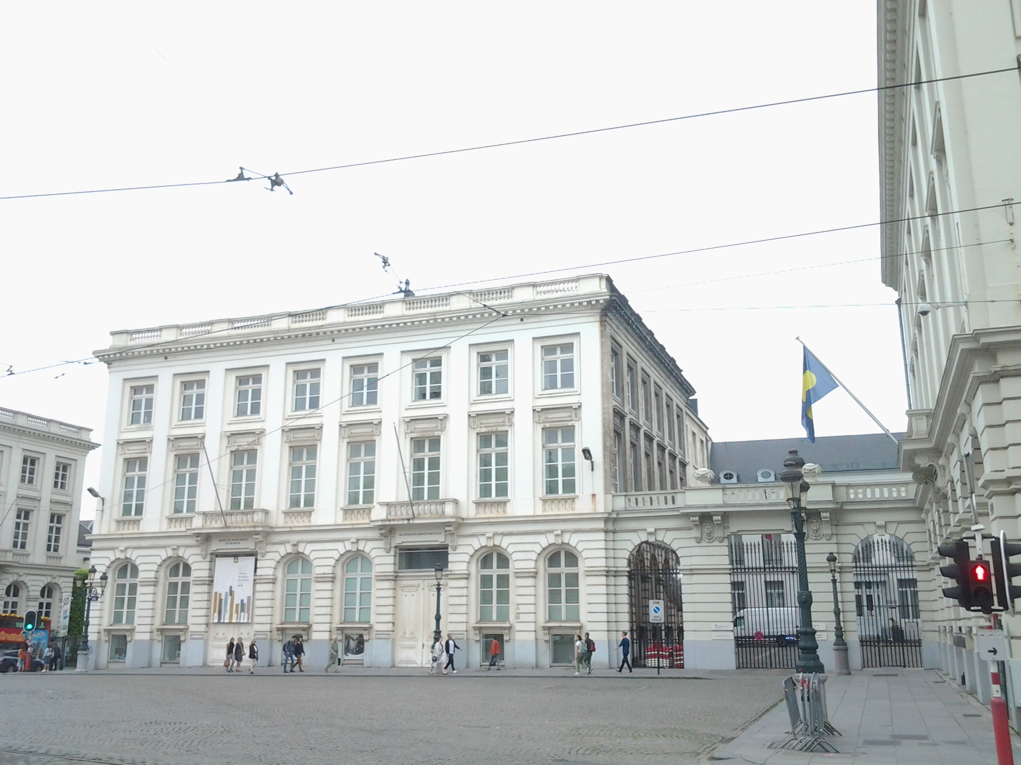 Façade de l'Hôtel de Spangen donnant sur la Place Royale en juin 2016